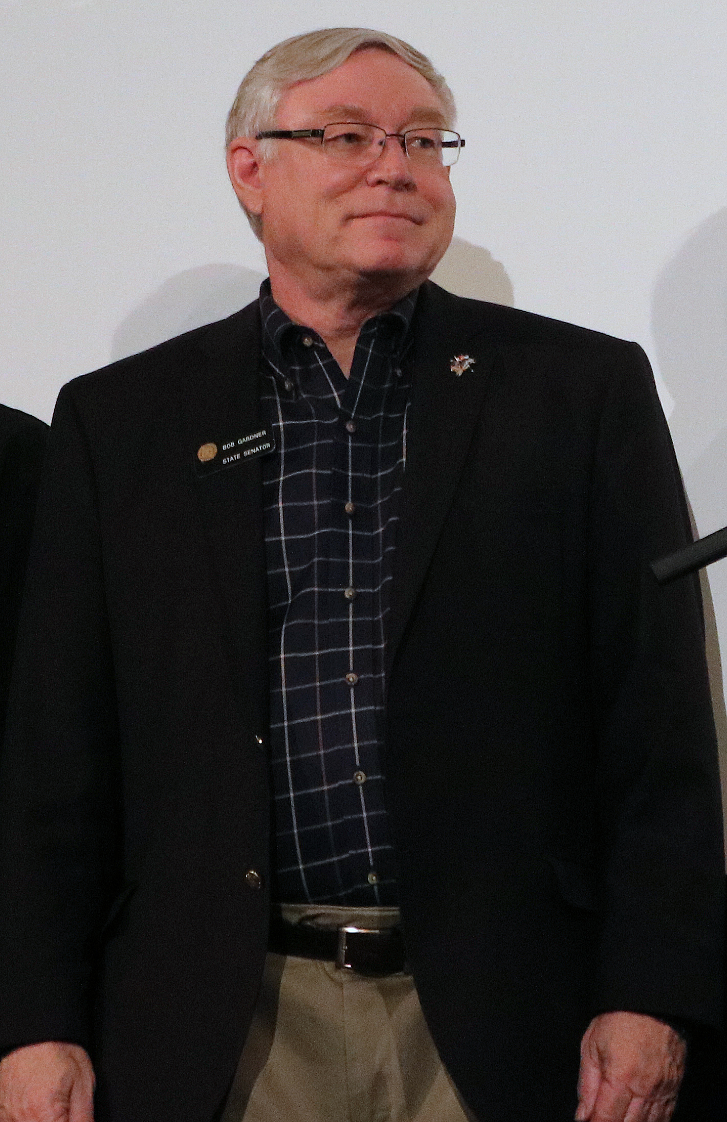 Bob Gardner, a politician from Colorado.